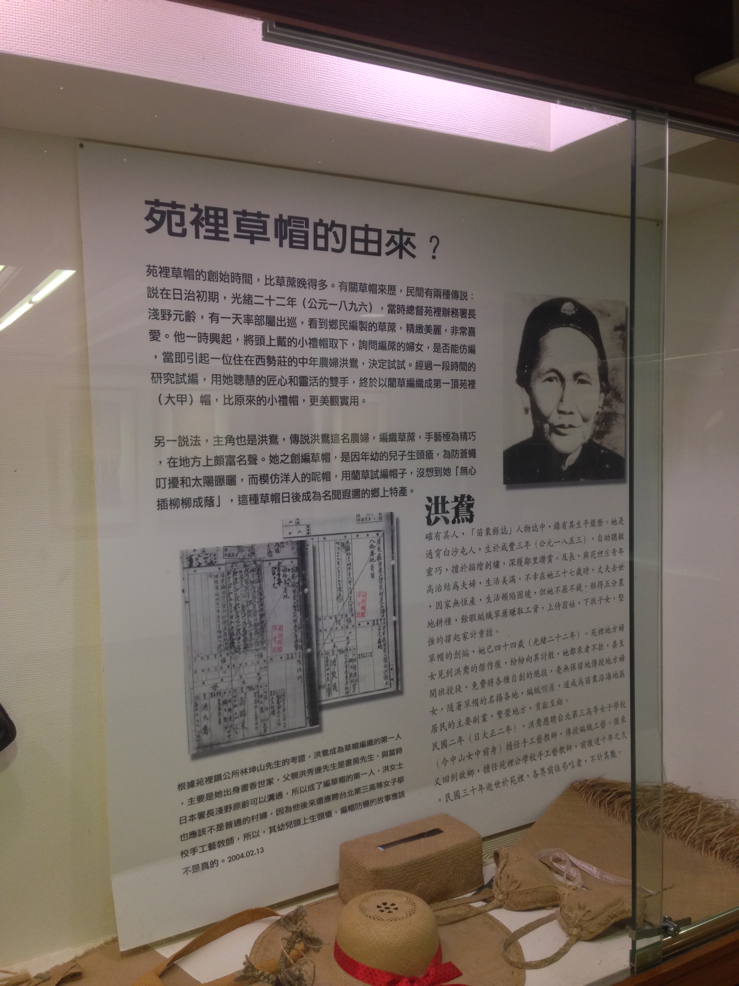 苑裡鎮藺草文化館展覽解說表示，據前苗栗縣苑裡鎮公所主任秘書林坤山考證，洪鴦出身知識分子家庭，父親洪秀連為書房先生。